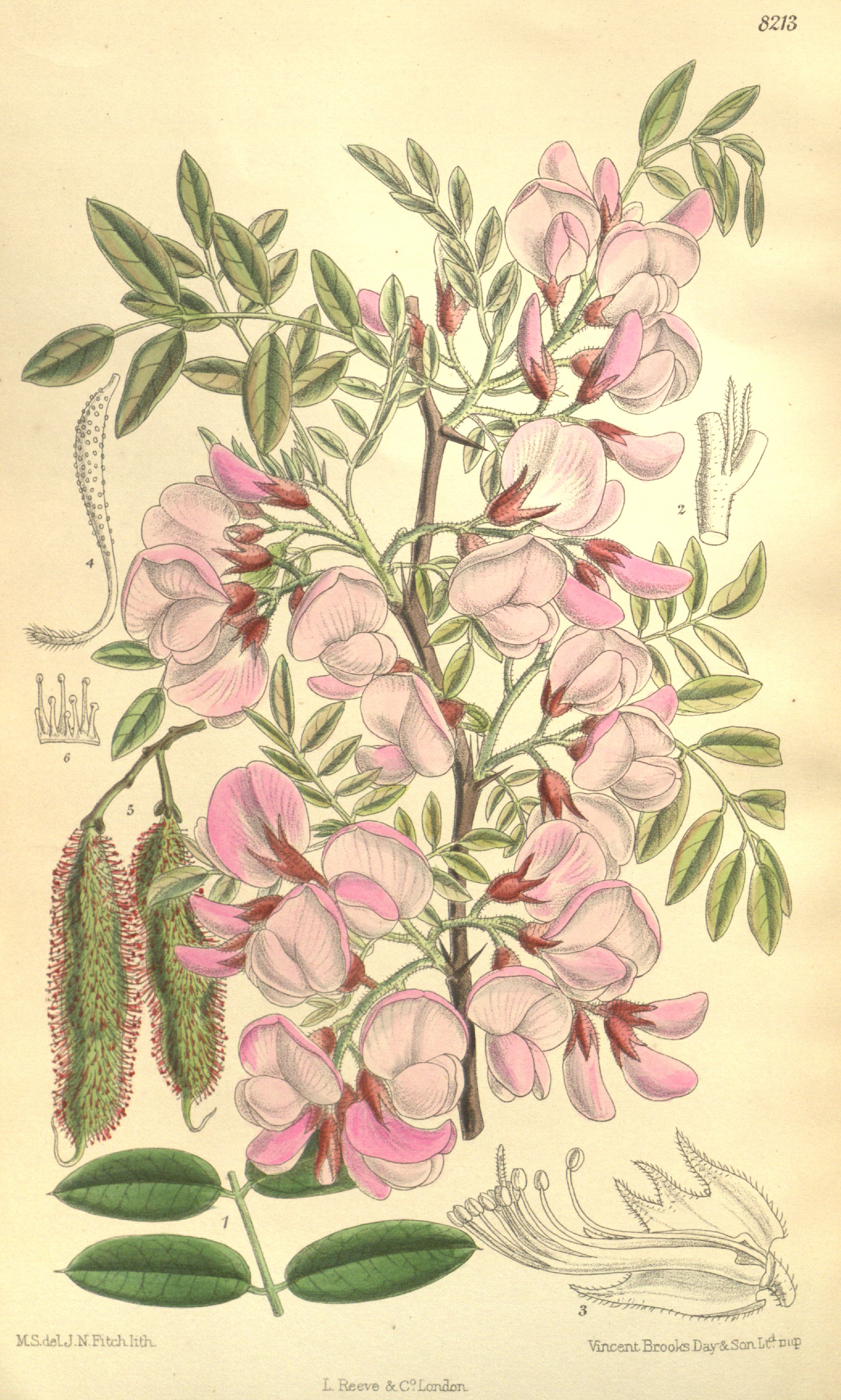 Robinia hispida var. kelseyi